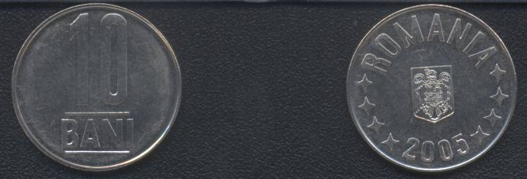 Romanian coin